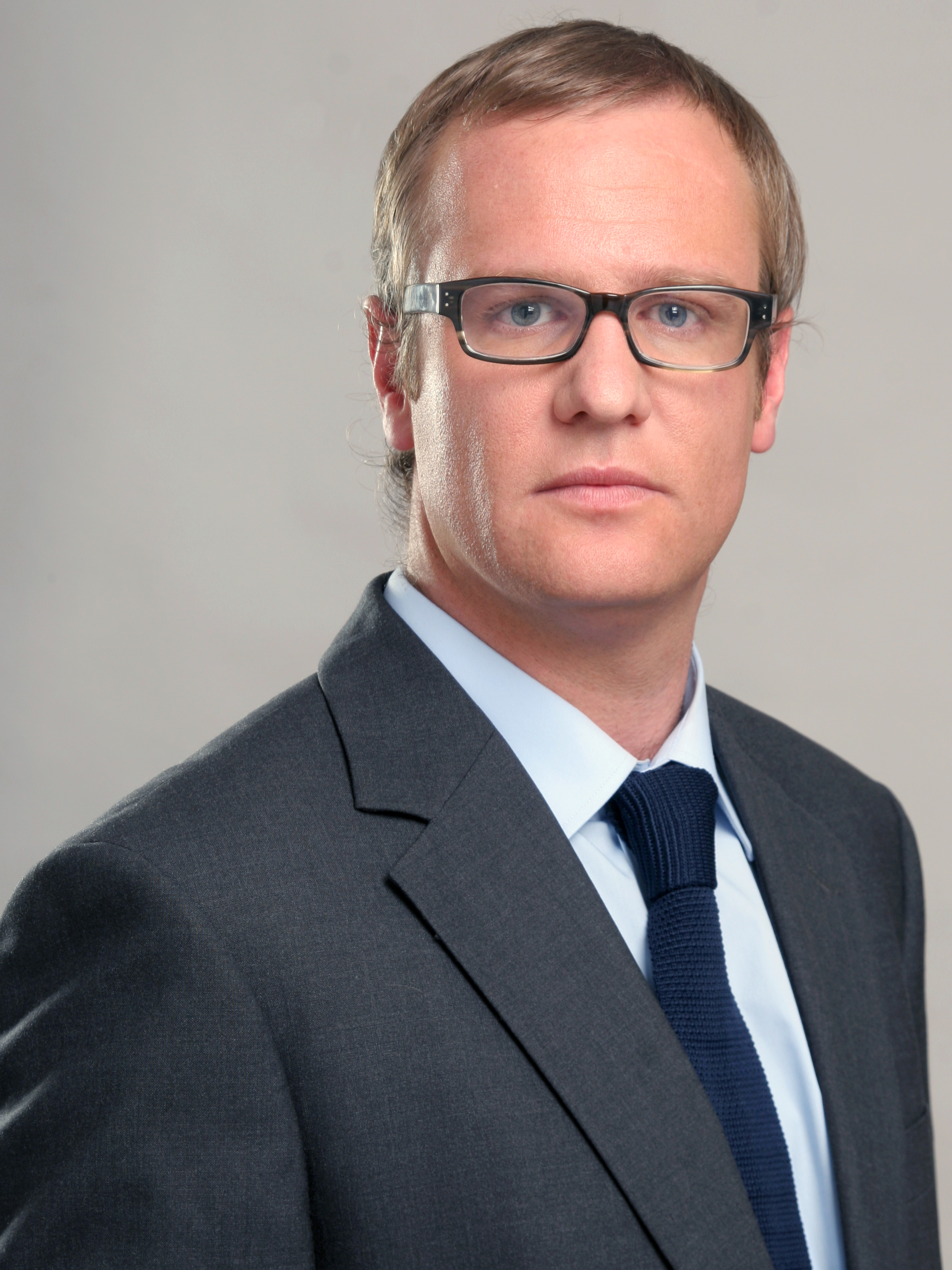 Felipe Kast, economista chileno.